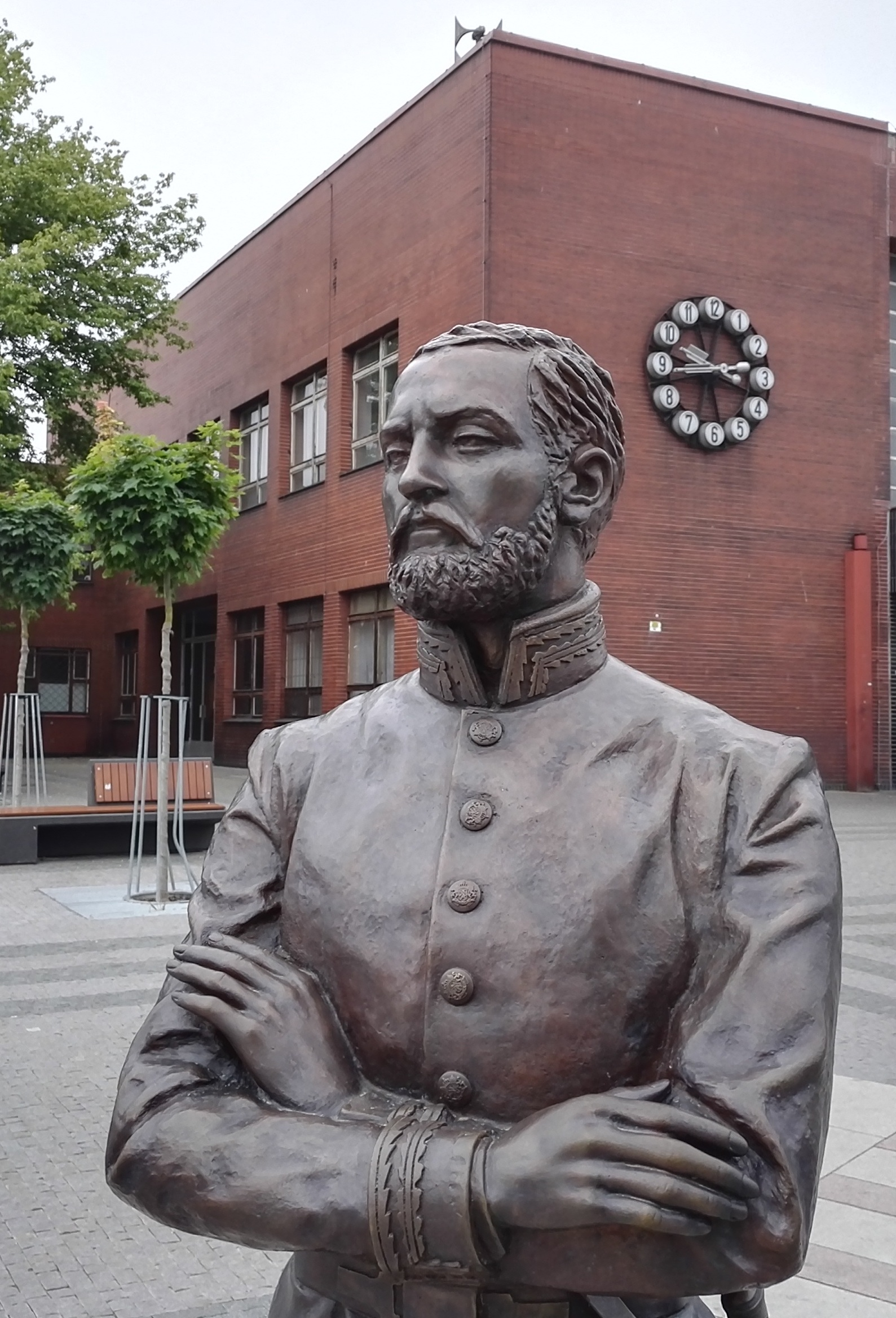 Bronzová socha Jana Pernera - detail. Sochu vytvořil sochař Jaroslav Brož. V roce 2017 byla instalována na náměstí Jana Pernera před nádražím v Pardubicích.